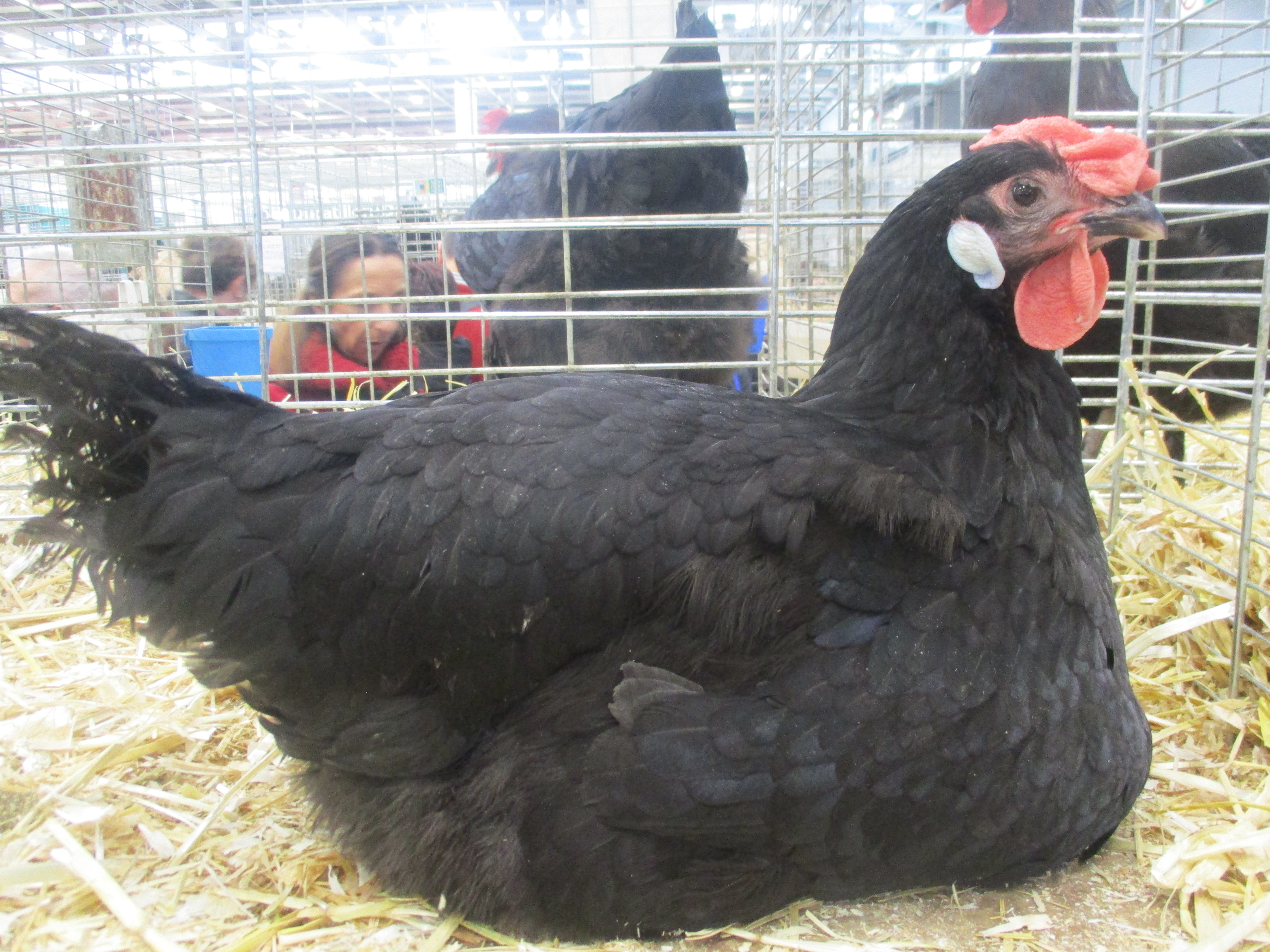 Poule du Mans, Salon de l'agriculture.